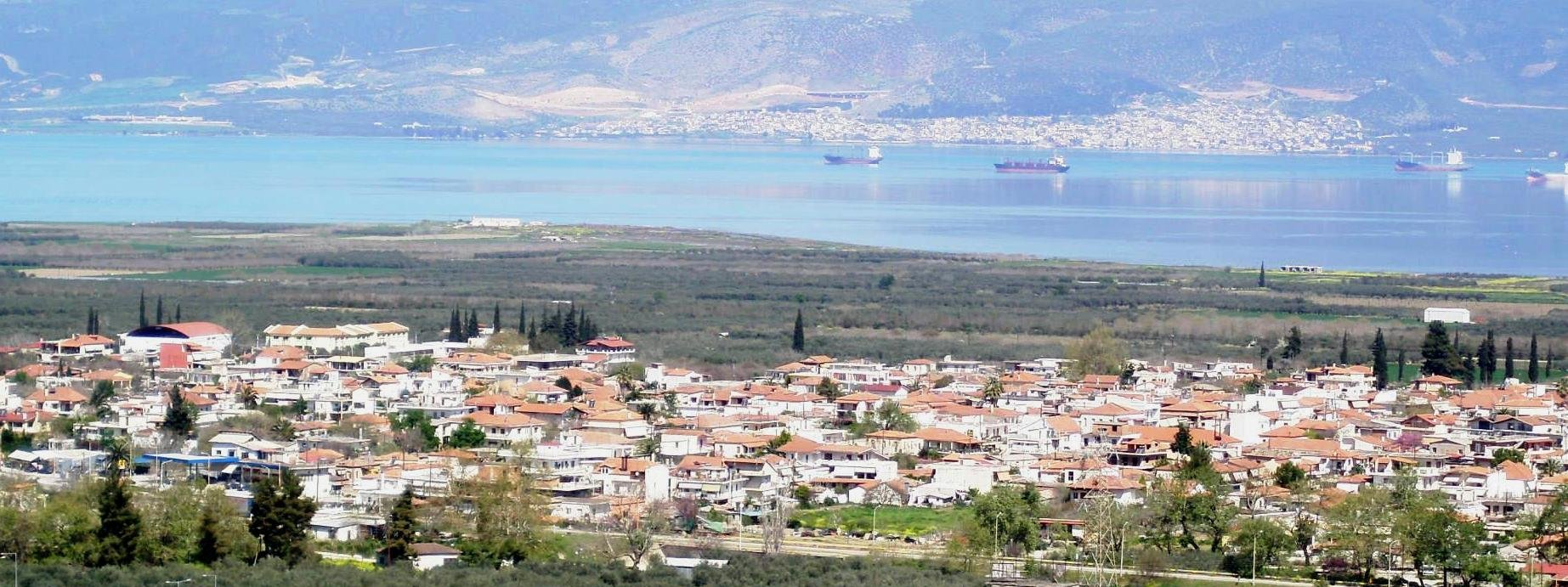 Ζουμάροντας προς τον Μώλο και τον Μαλιακό